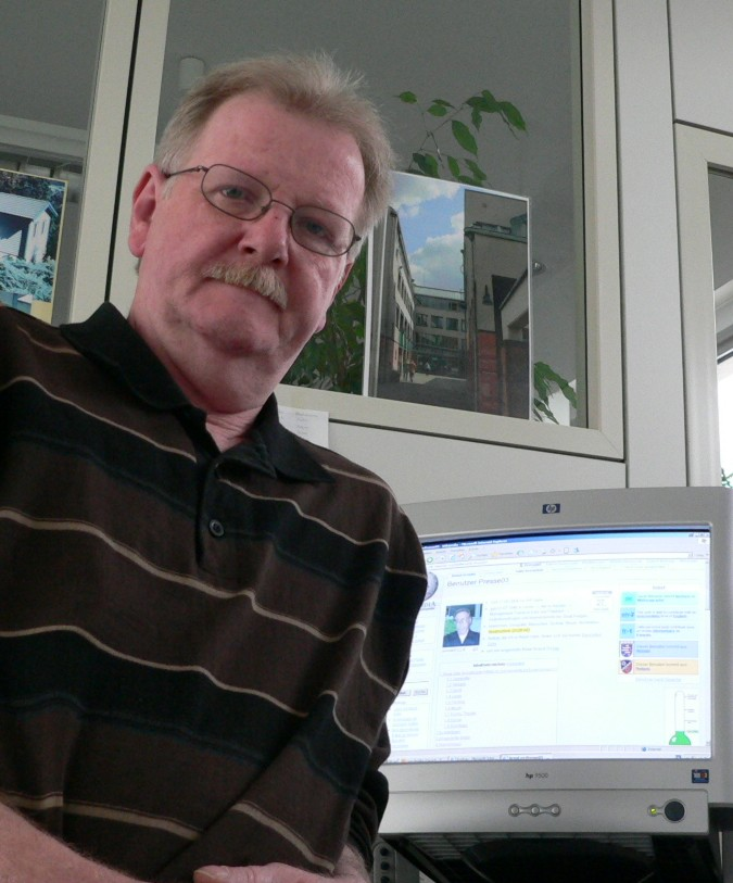 Presse03